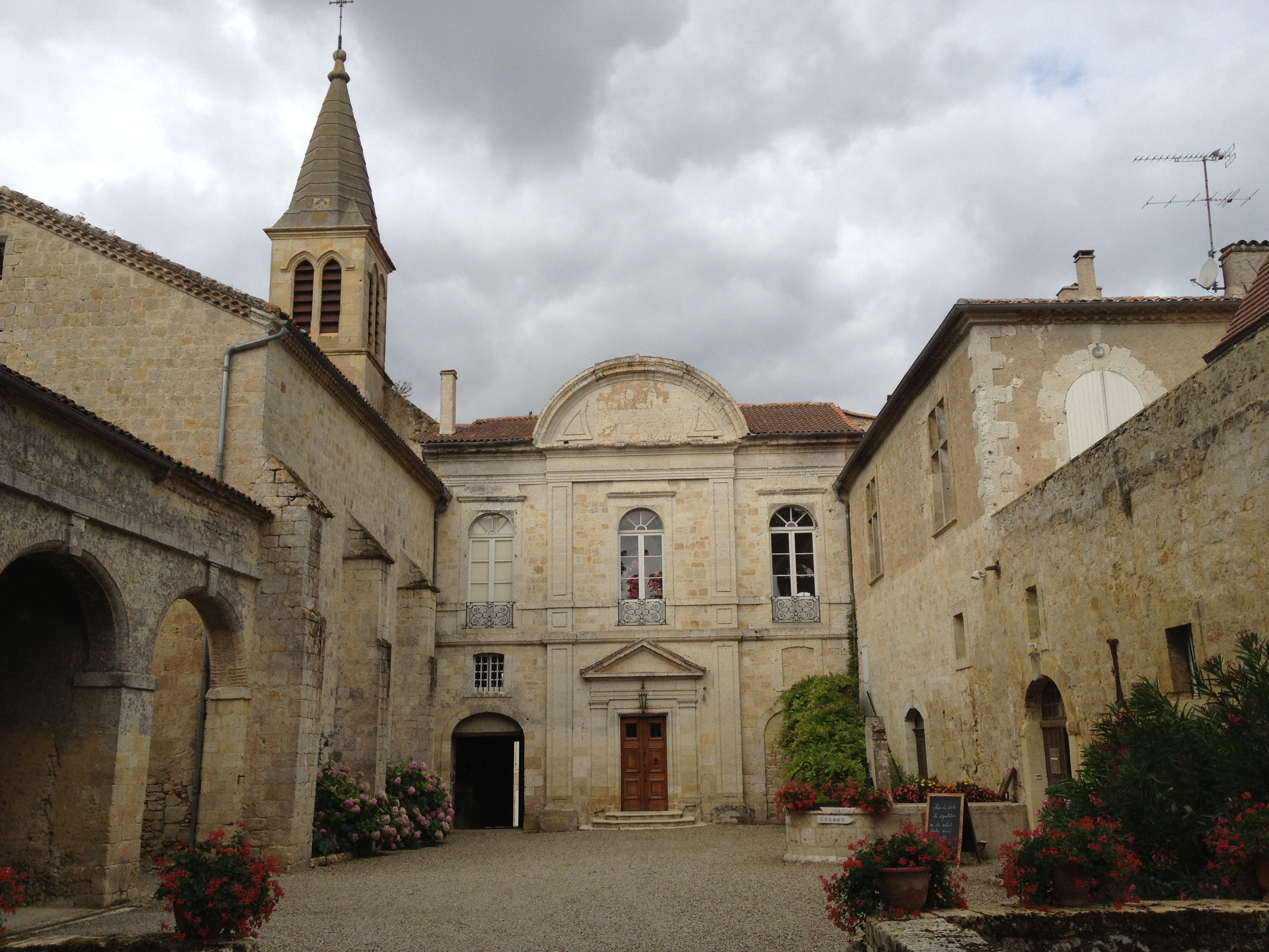 Château de Cassaigne dans le Gers